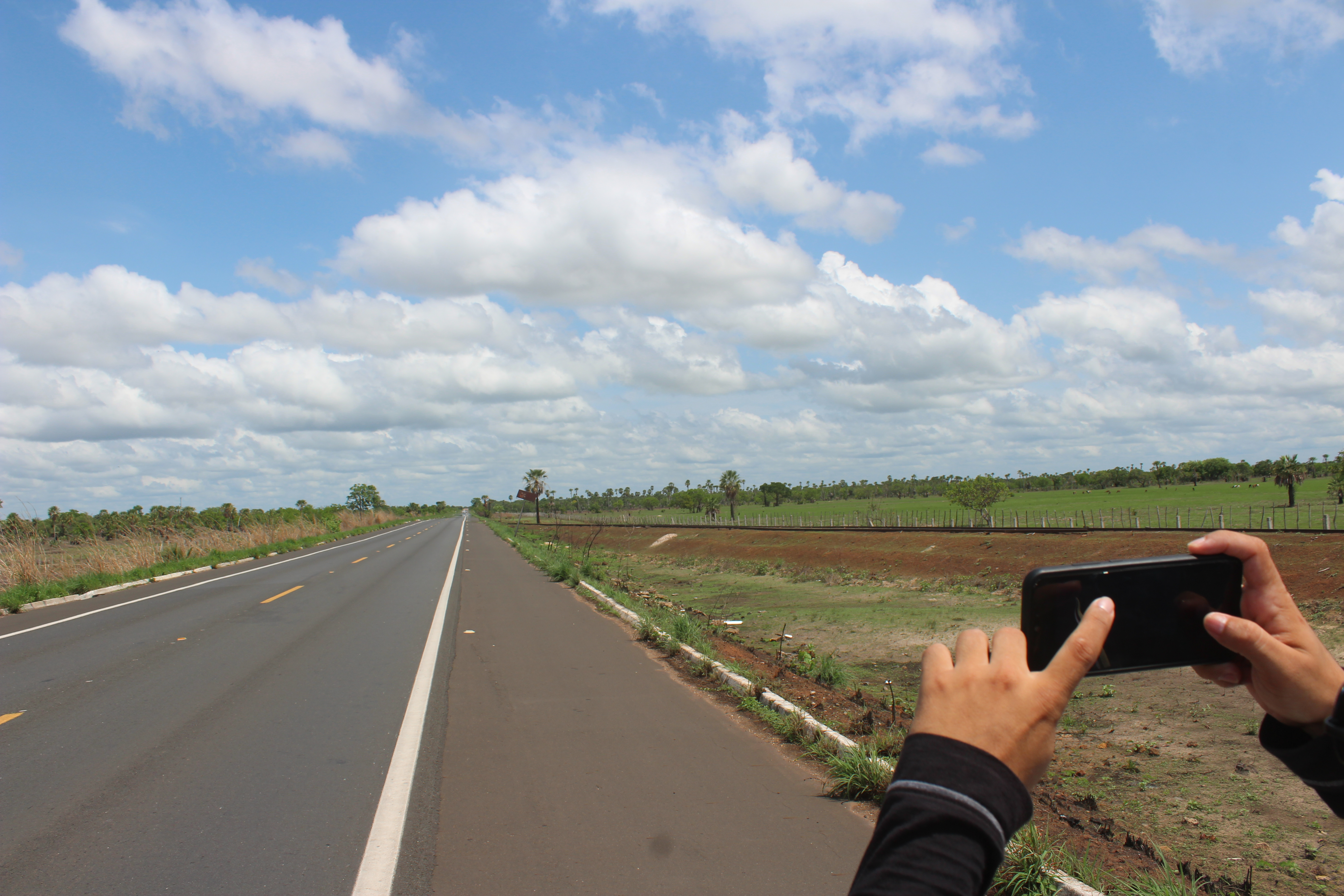 Cruzamento da Ferrovia Teresina-Parnaíba na rodovia BR-343, perto de Campo Maior.